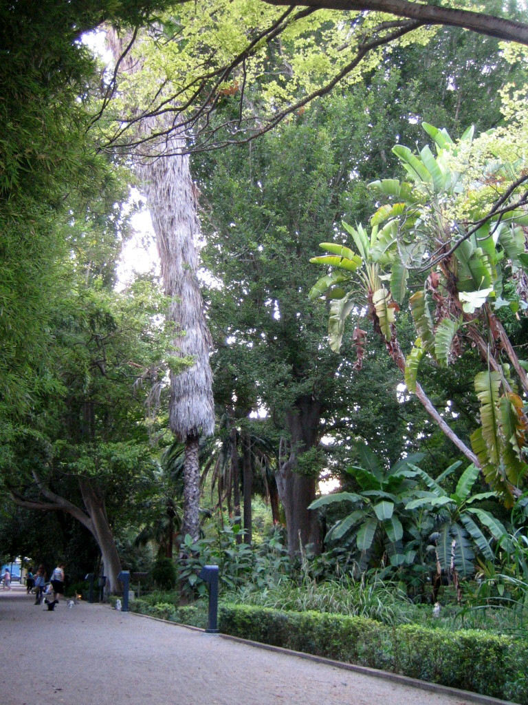 Jardín botánico de Valencia, España.